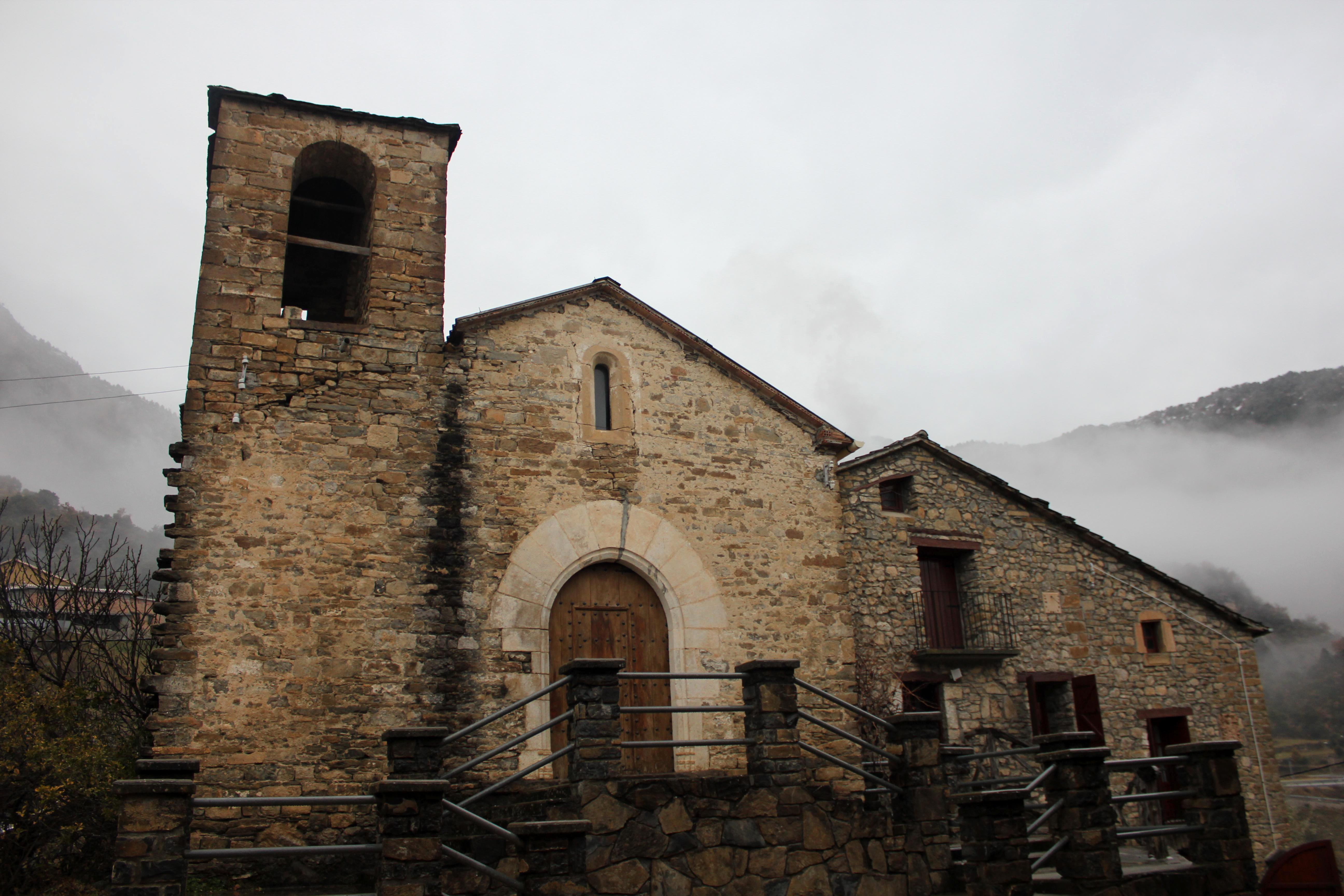 Aragonés: A ilesia de La Foradada d'el Toscar (Ribagorza).